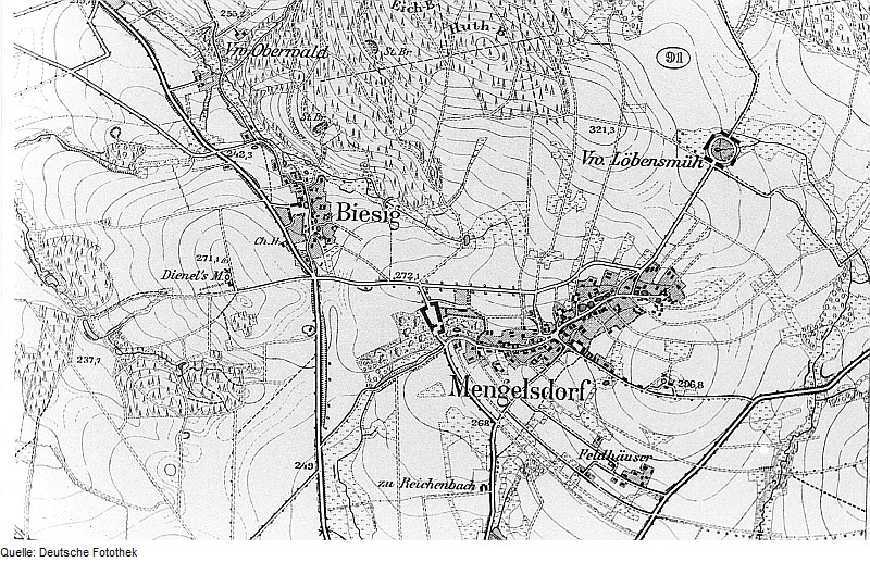 Original image description from the Deutsche Fotothek Reichenbach/O.L.-Mengelsdorf. Ausschnitt aus: Meßtischblatt, Sekt. Reichenbach, 1886